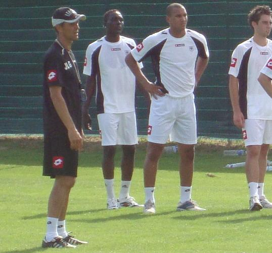 Jean-Louis Garcia (à gauche) à l'entrainement du SCO le 2 juillet 2009. De gauche à droite : Jean-Louis Garcia, Matar Fall, Kevin Olimpa, Pierre Caillaud.